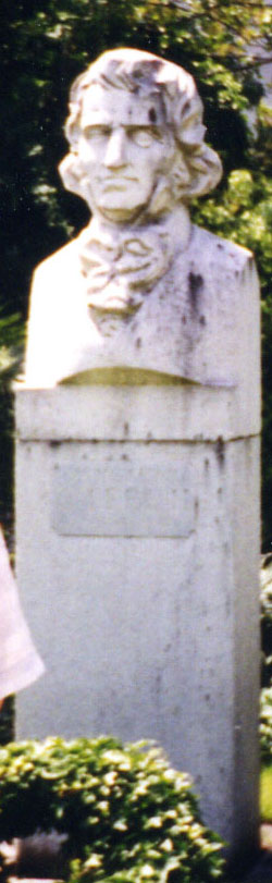 Бюст Х.Х. Стевена в Никитском ботаническом саду